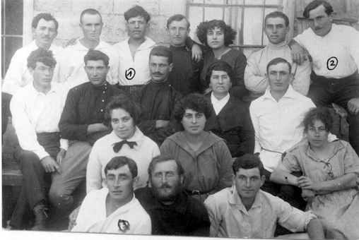 (הבשקירים). 1מאיר ברנר, 2דוד זלינגר, 3יעקב זלטין. צולם במלחמיה (מנחמיה)ג' אדר תרפ"ב 1921-2